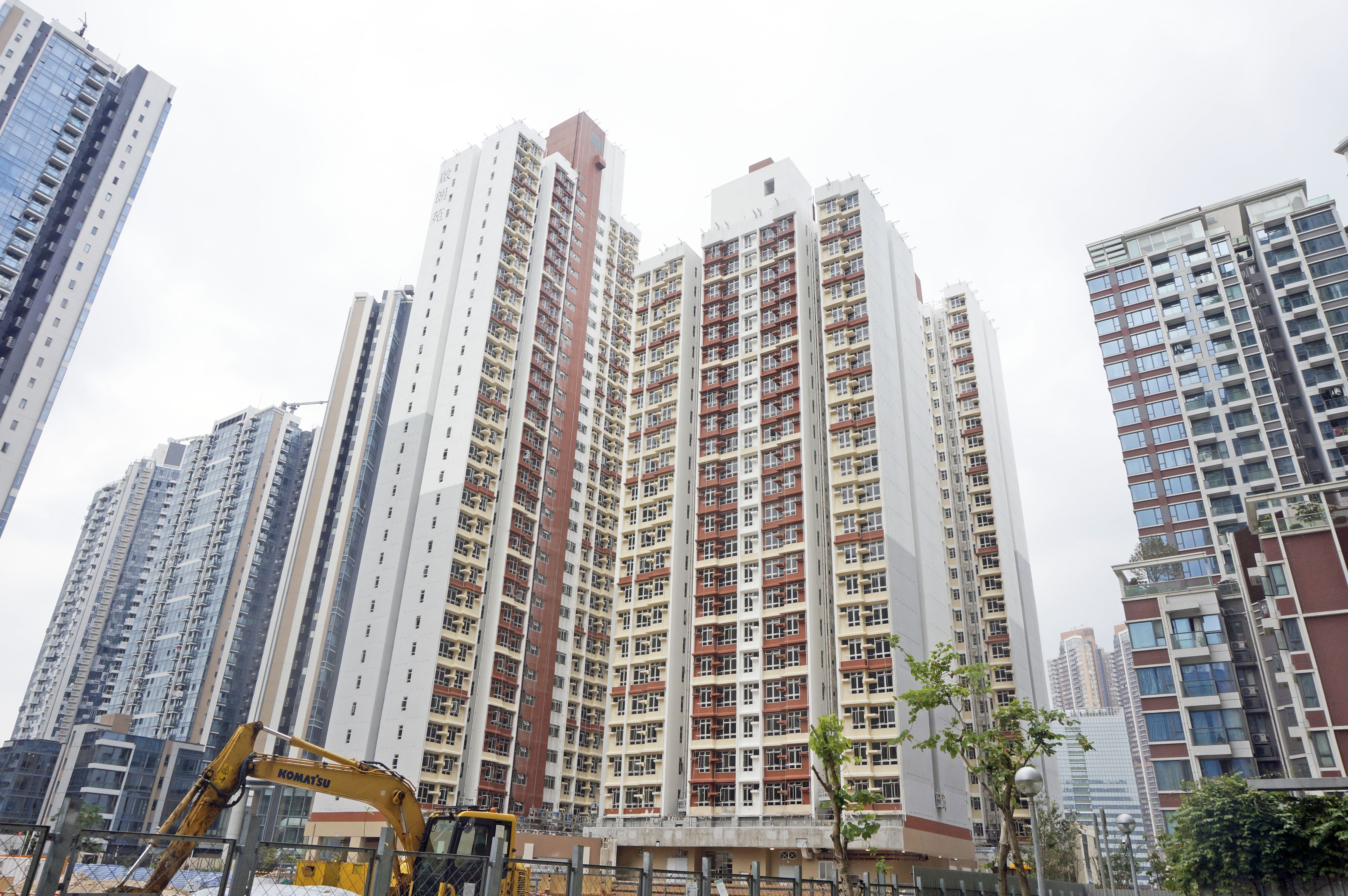 居者有其屋計劃的啟朗苑